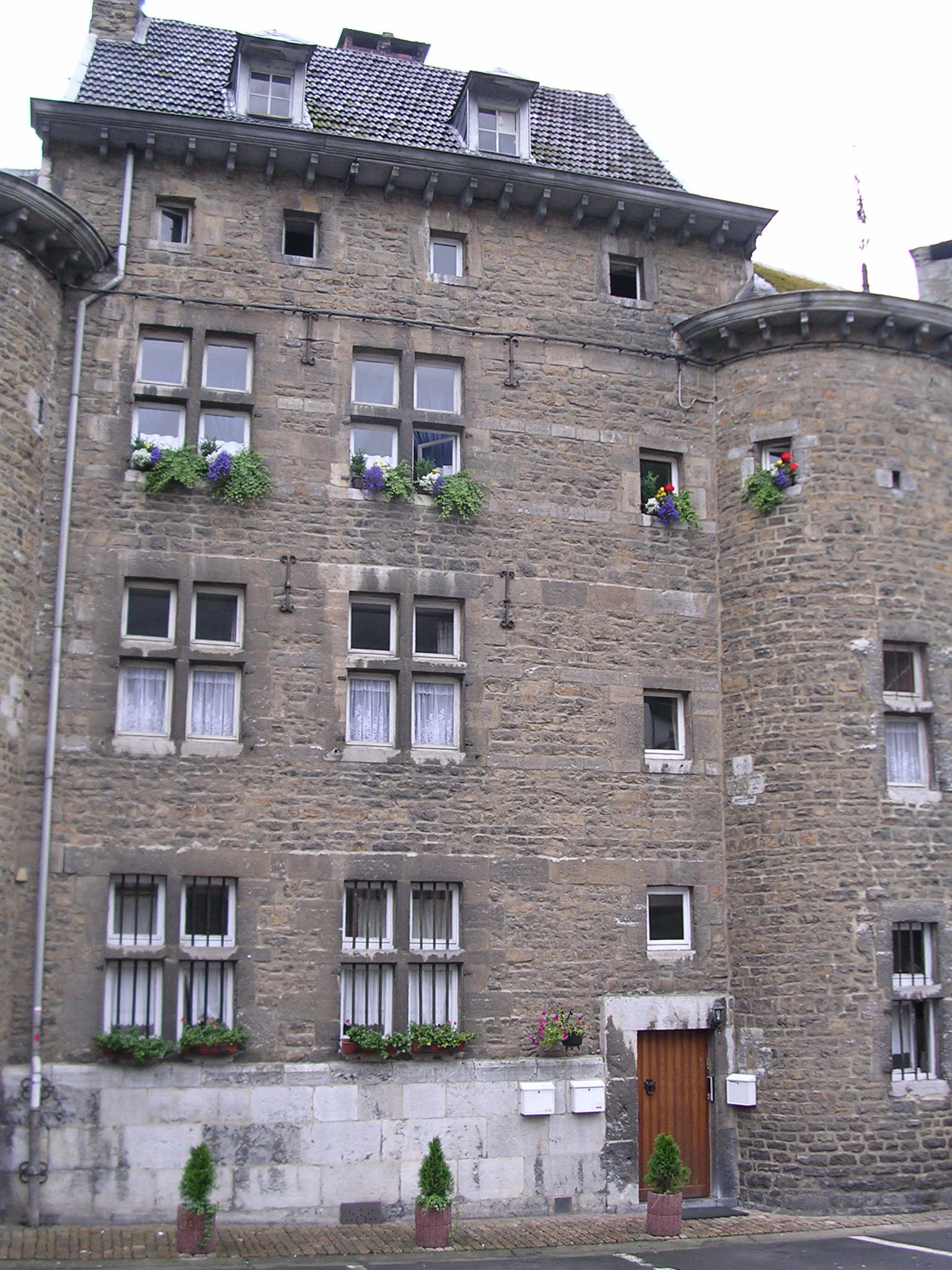 maison ancienne